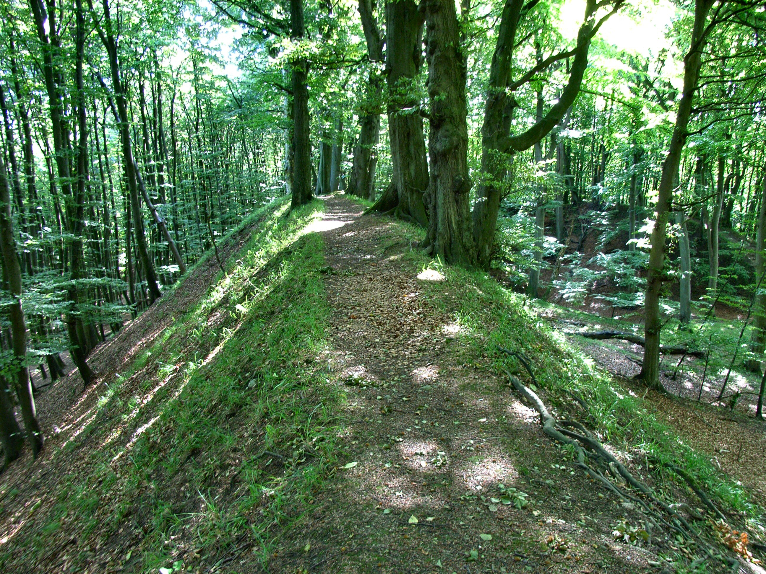 Wall der Herthaburg – einer slawischen Burganlage auf der Halbinsel Jasmund der Insel Rügen